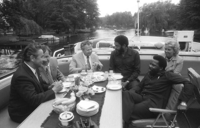 ADN-ZB Reiche 10.6.82 Berlin: Besuch Bishop Die Partei-und Regierungsdelegation Grenadas unter Leitung des Vorsitzenden des Politbüros des ZK der Neuen Jewel Bewegung und Ministerpräsidenten der Revolutionären Volksregierung Grenadas, Maurice Bishop, unternahm am 9.6. mit dem Motorschiff "Köbis"eine Seerundfahrt auf den Berliner Gewässern. Der Gast wurde von Hermann Axen, Mitglied des Politbüros und Sekretär des ZK der SED (3.v.l.), und Heinz Kuhrig, Minister für Land, Forst und Nahrungsgüterwirtschaft (l.) begleitet. Rechts; Unison Whitemann, Mitglied des Politbüros der Neuen Jewel Bewegung und Minister für Auswärtige Angelegenheiten Grenadas.